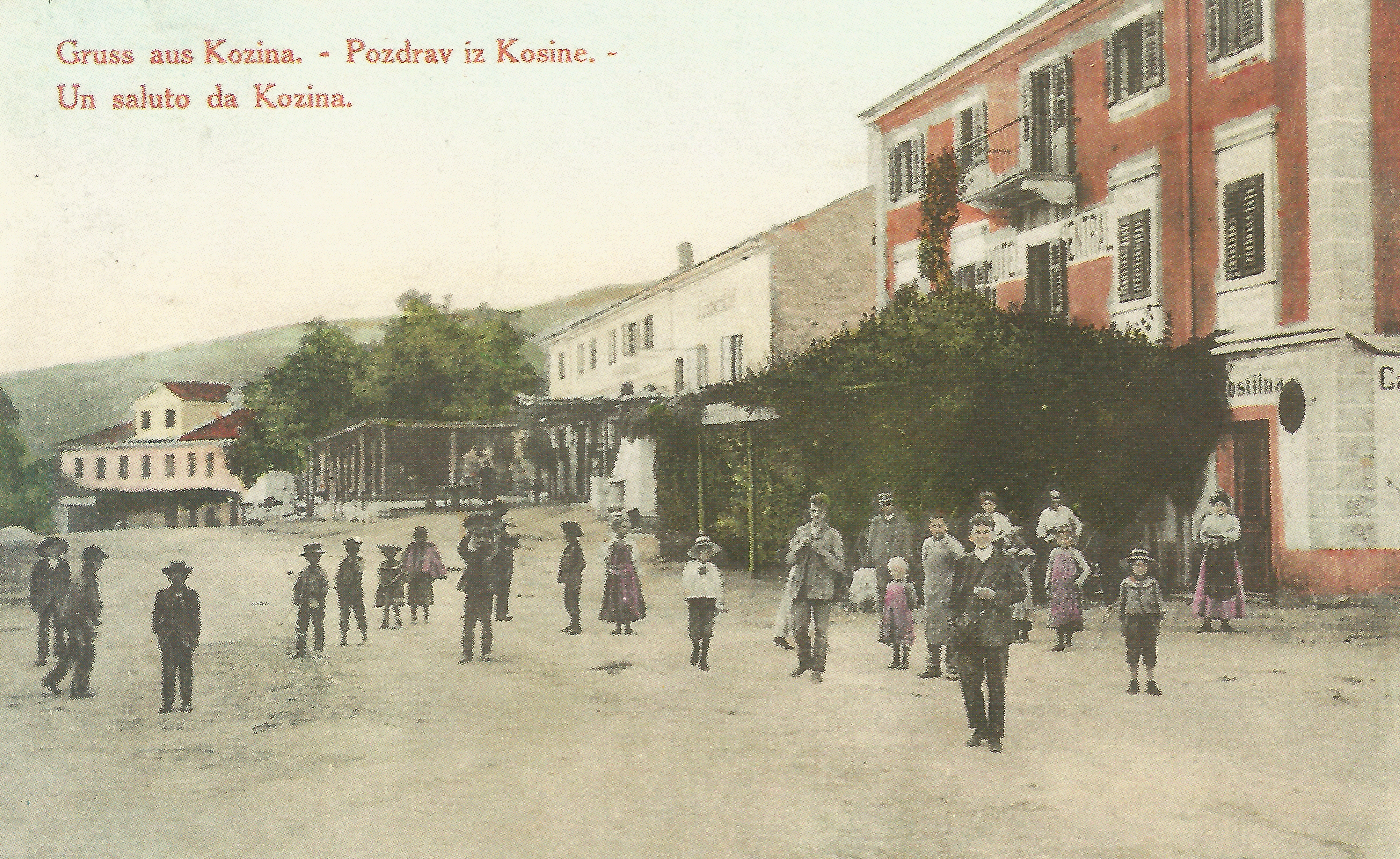 Razglednica Kozine.